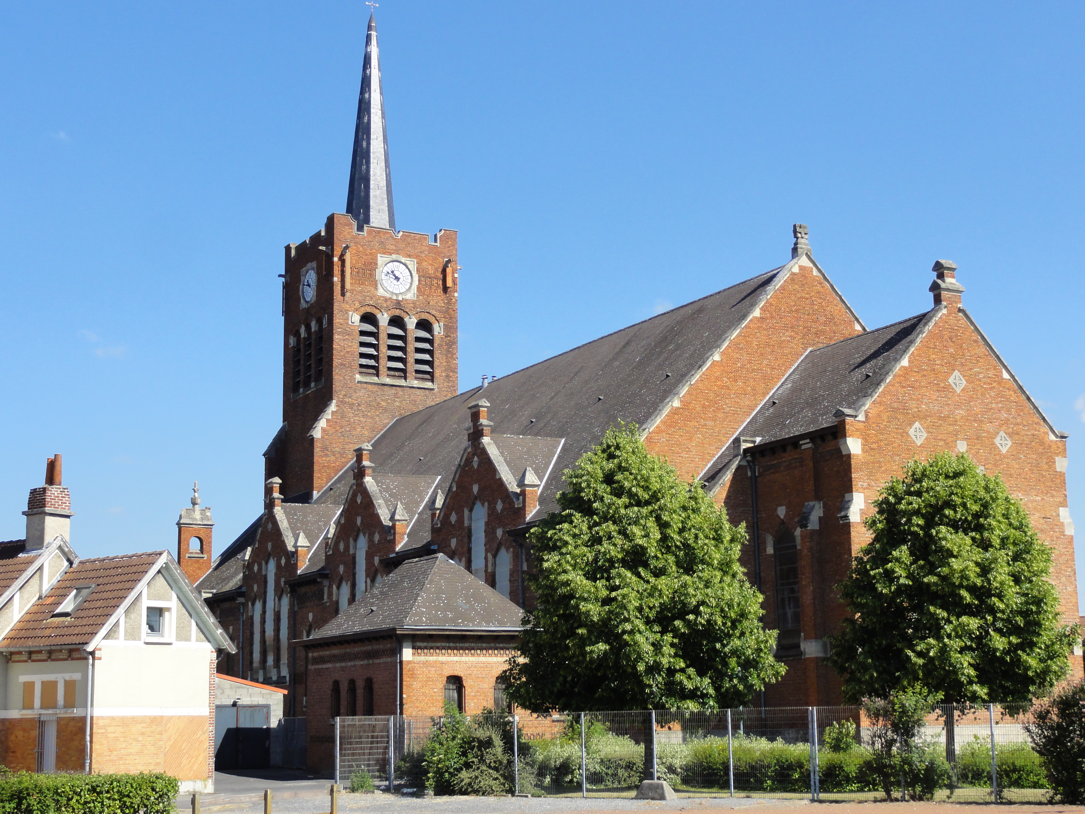 Église Notre-Dame des Mineurs des cités de la Fosse Notre Dame de la Compagnie des mines d'Aniche, Waziers, Nord, Nord-Pas-de-Calais, France. .